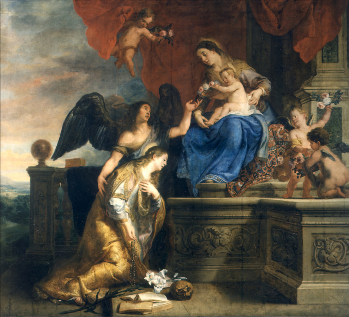 detail